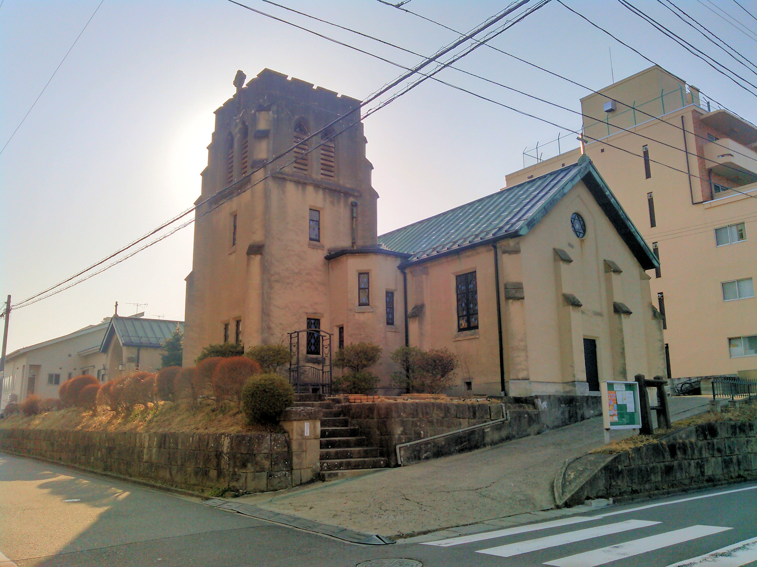 郡山市の聖ペテロ聖パウロ教会